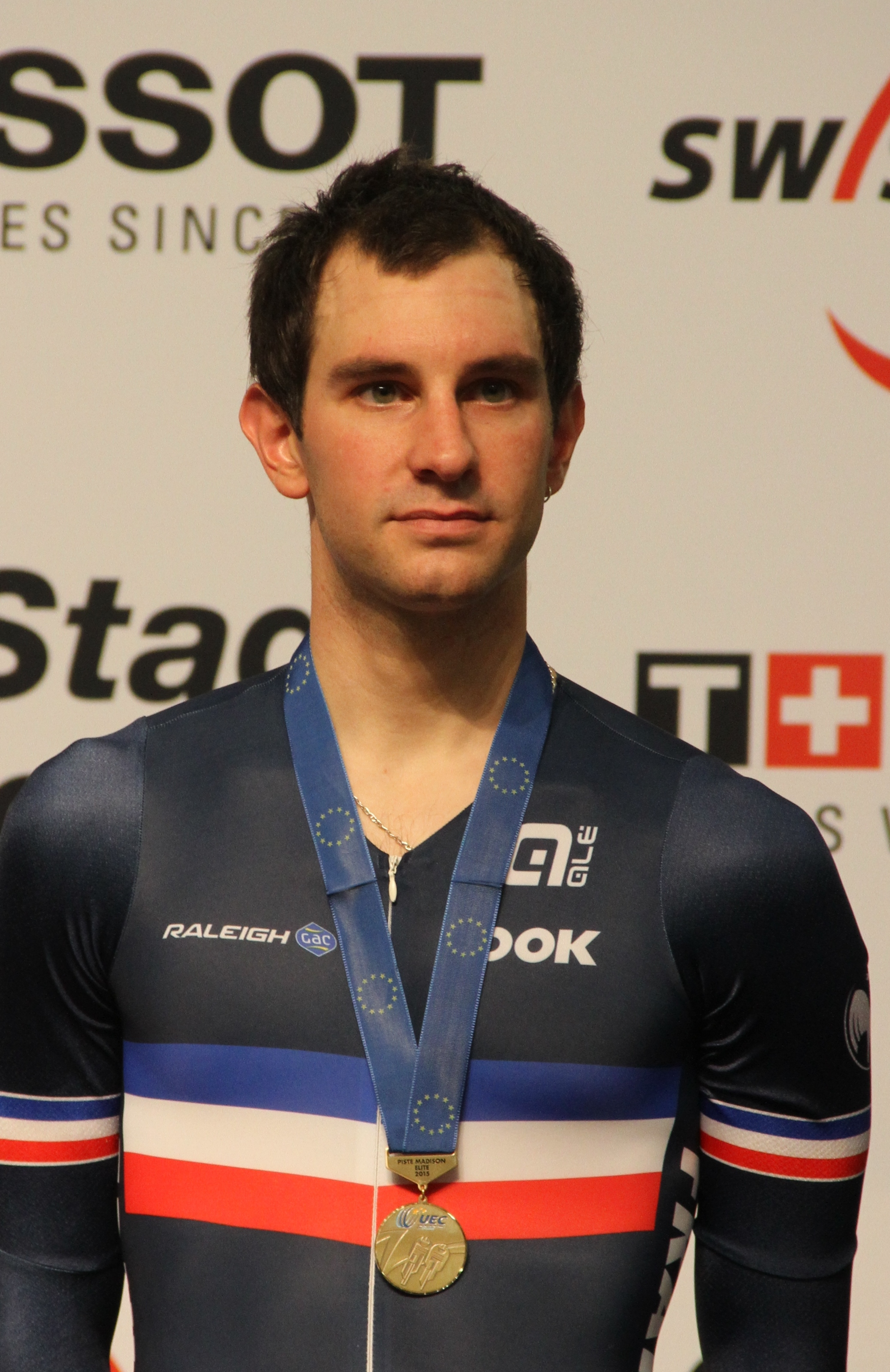 Morgan Kneisky, franz. Radsportler The making of this document was supported by the Community-Budget of Wikimedia Germany.